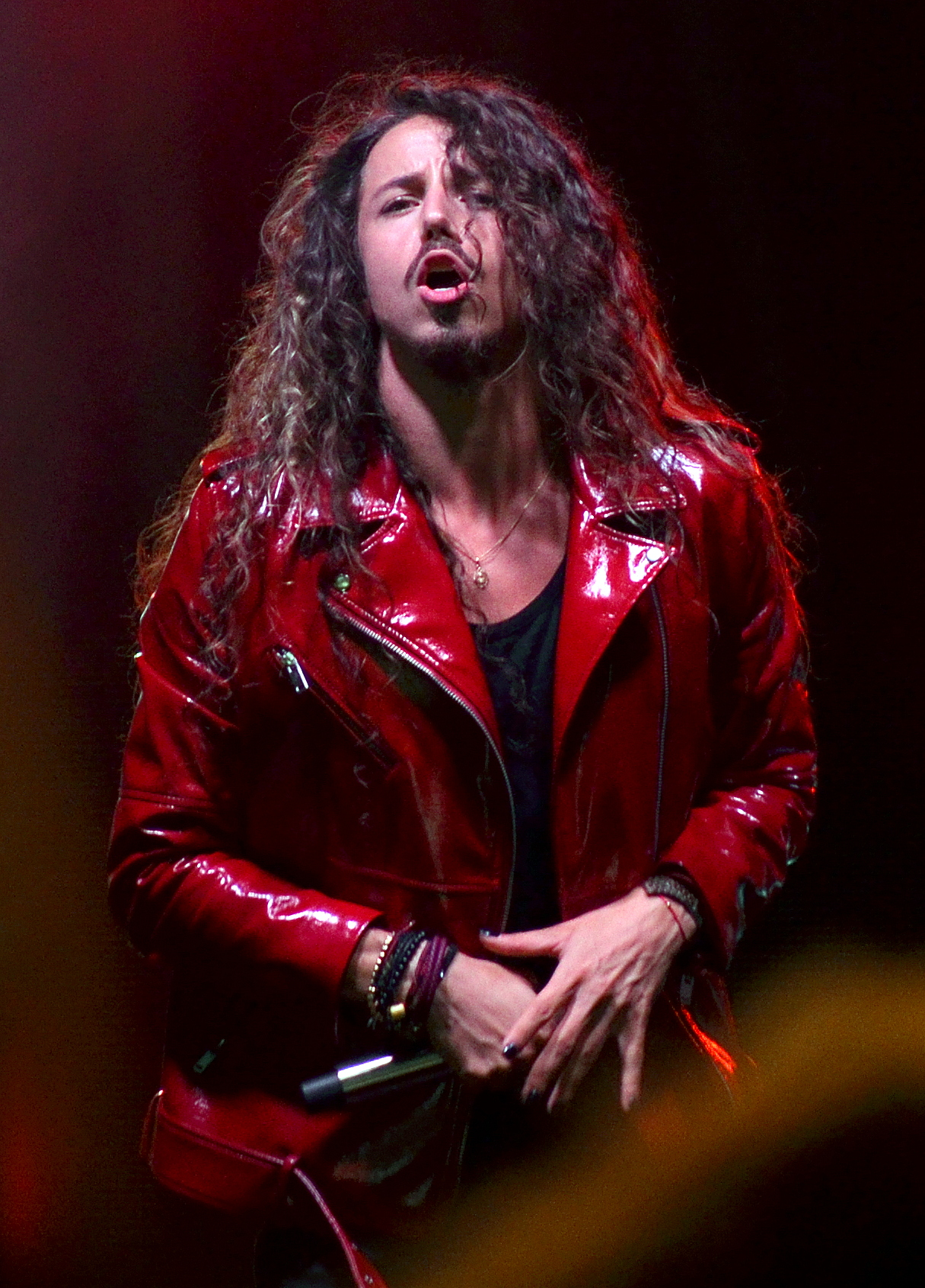 Michal Szpak, Bielitz-Biala